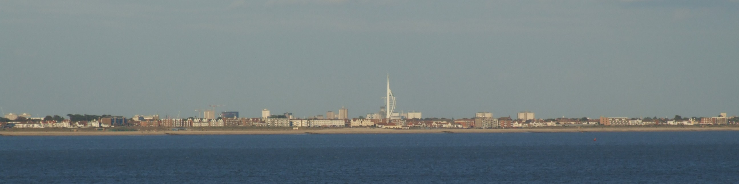 Portmouth vue de la mer, Portsmouth, Royaume-Uni